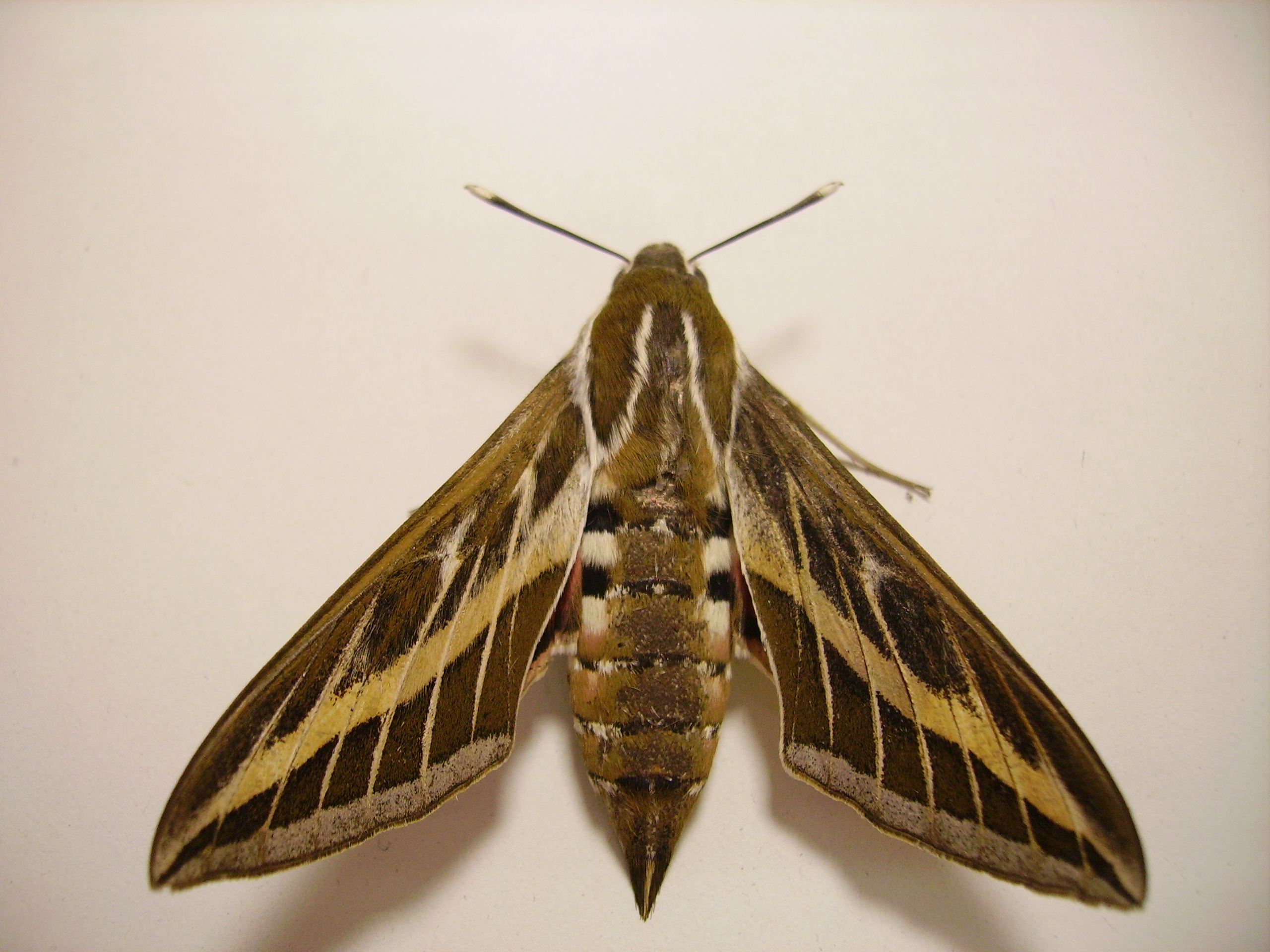 Hyles livornica muerta fotografiada en Sevilla por Alejandro Ibáñez Costa